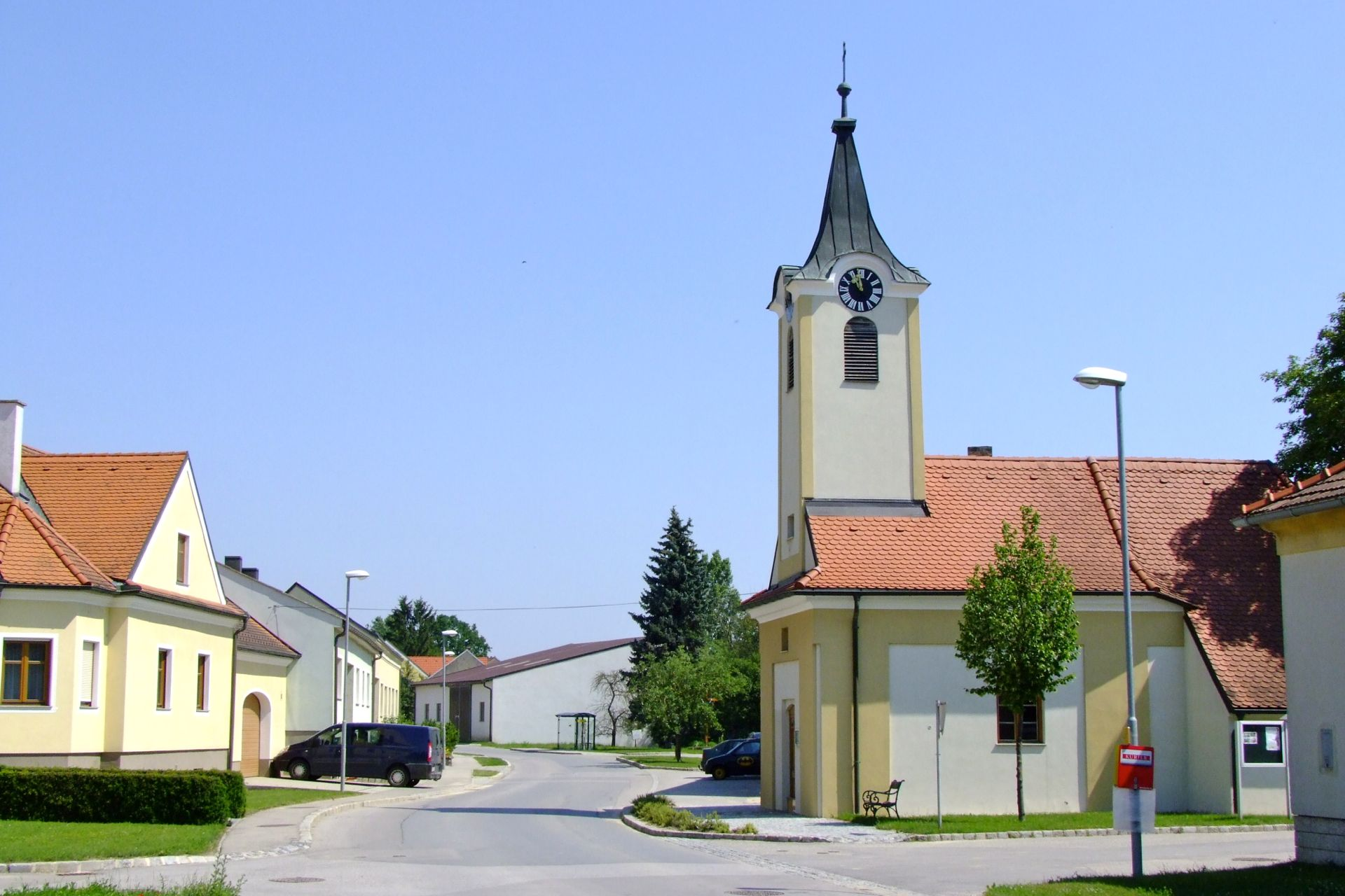 Ortskapelle hl. Benedikt